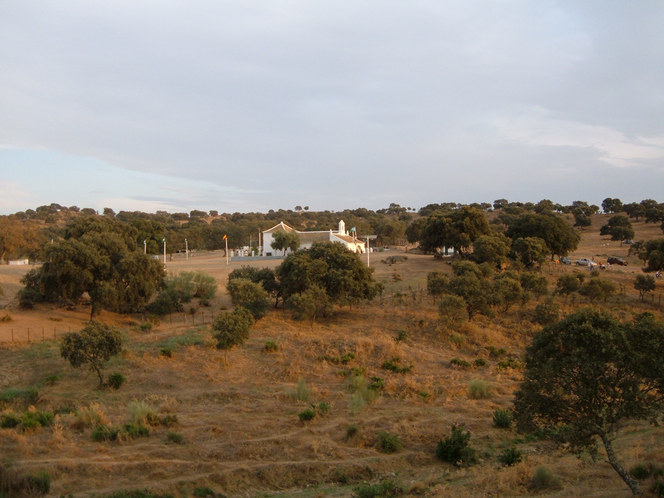 Panorámica-Situación Ermita V. Escardiel